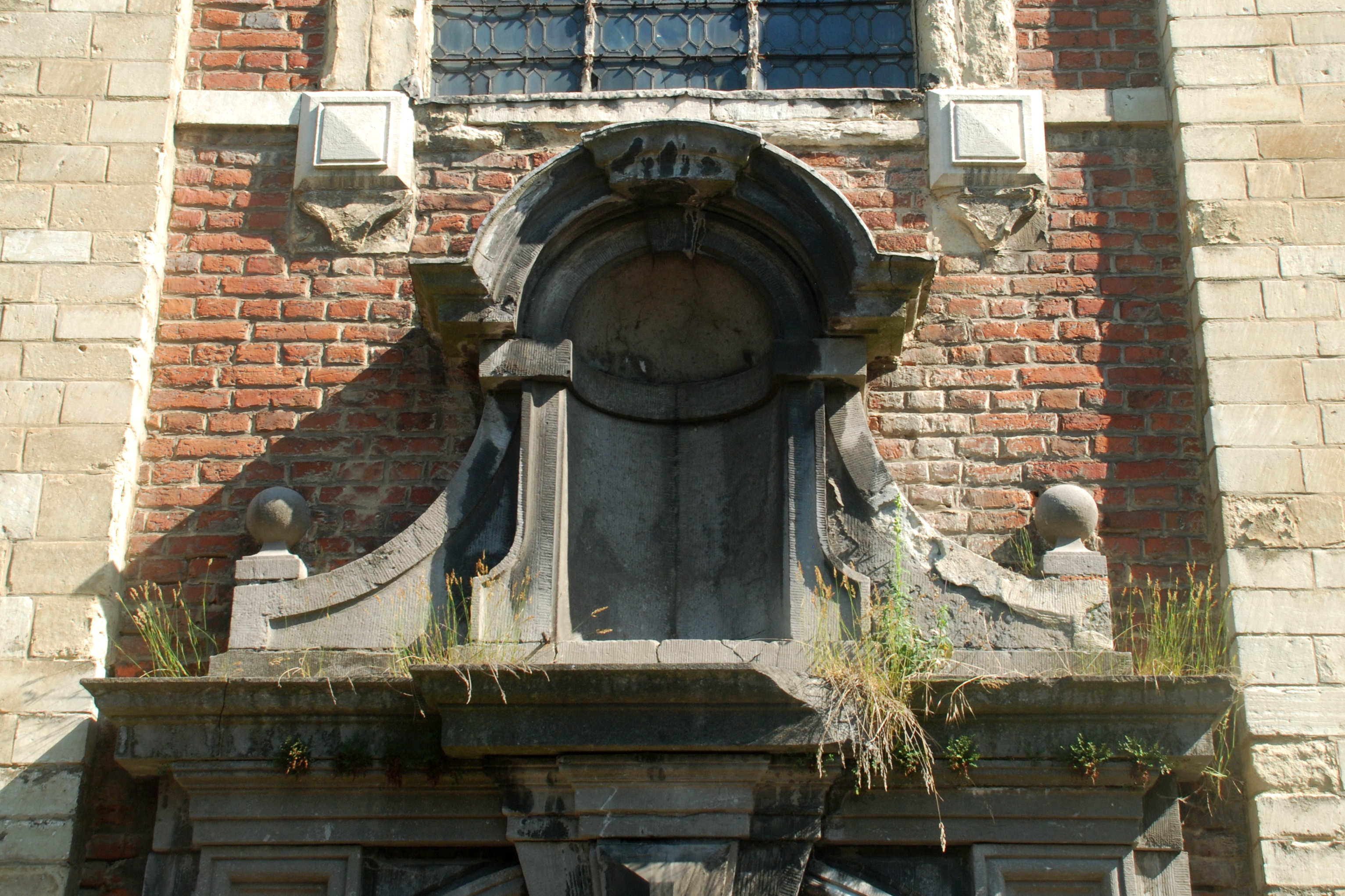 Belgique - Brabant flamand - Louvain (Leuven) - Chapelle des Sœurs Noires (Zwartzusterskapel)